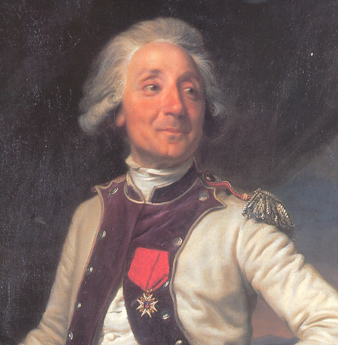 Jean-Baptiste Symon de Solémy, premier major général de l'infanterie à l'armée de Condé, Commandeur de l'Ordre de Saint-Louis (Régiment d'Auvergne règlement de 1779).